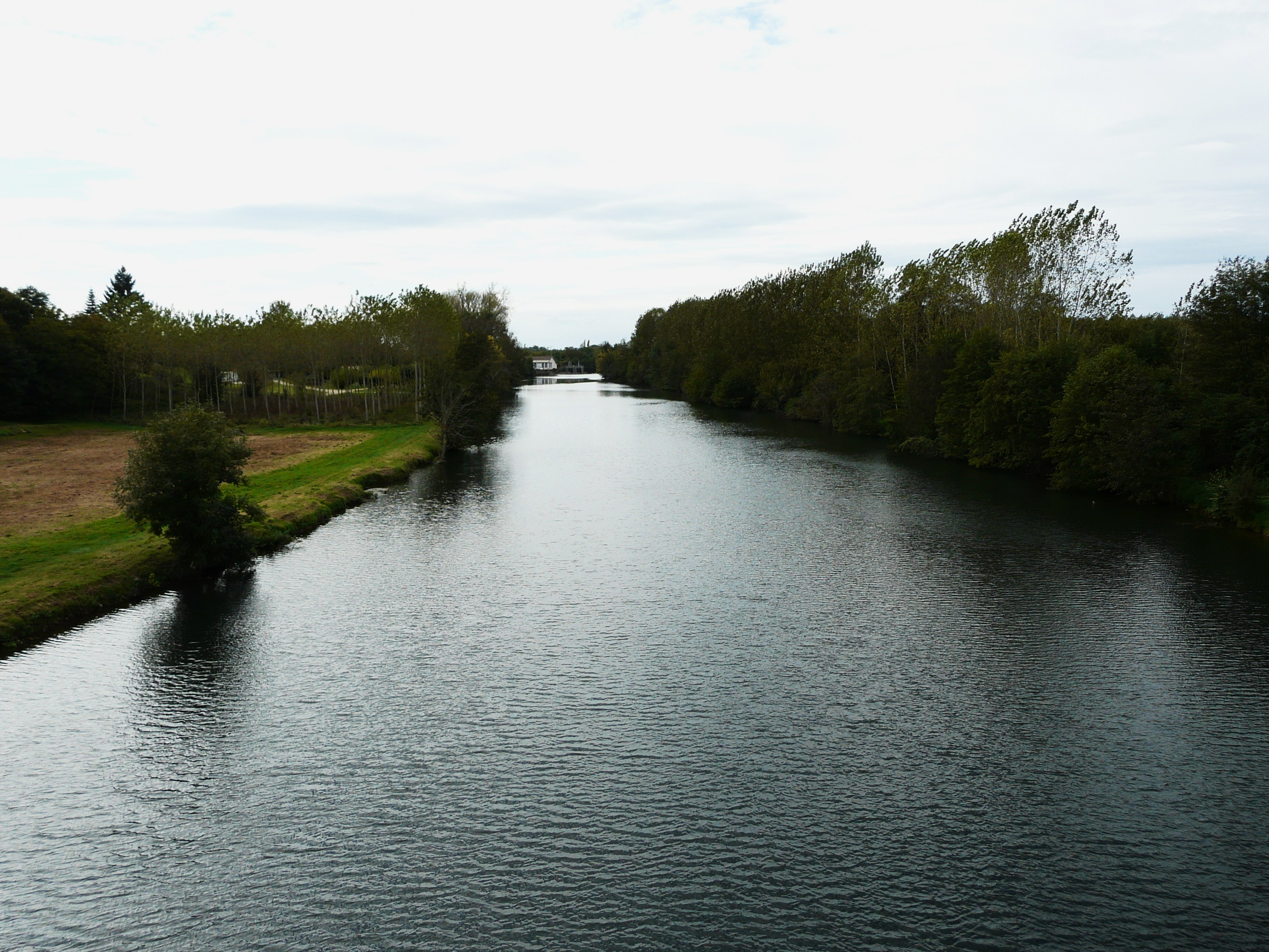 L'Isle en aval du pont de la route départementale 3E5, entre Sourzac (à gauche) et Saint-Louis-en-l'Isle (à droite), Dordogne, France.